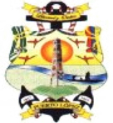 Escudo de Puerto López